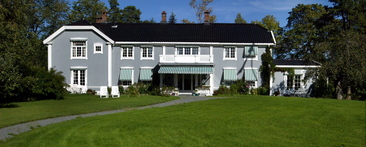 Skallum gård er en herregård beliggende på Stabekk i Bærum. This is the place where the top Norwegian Nazi leaders commited suicide in May, 1945.